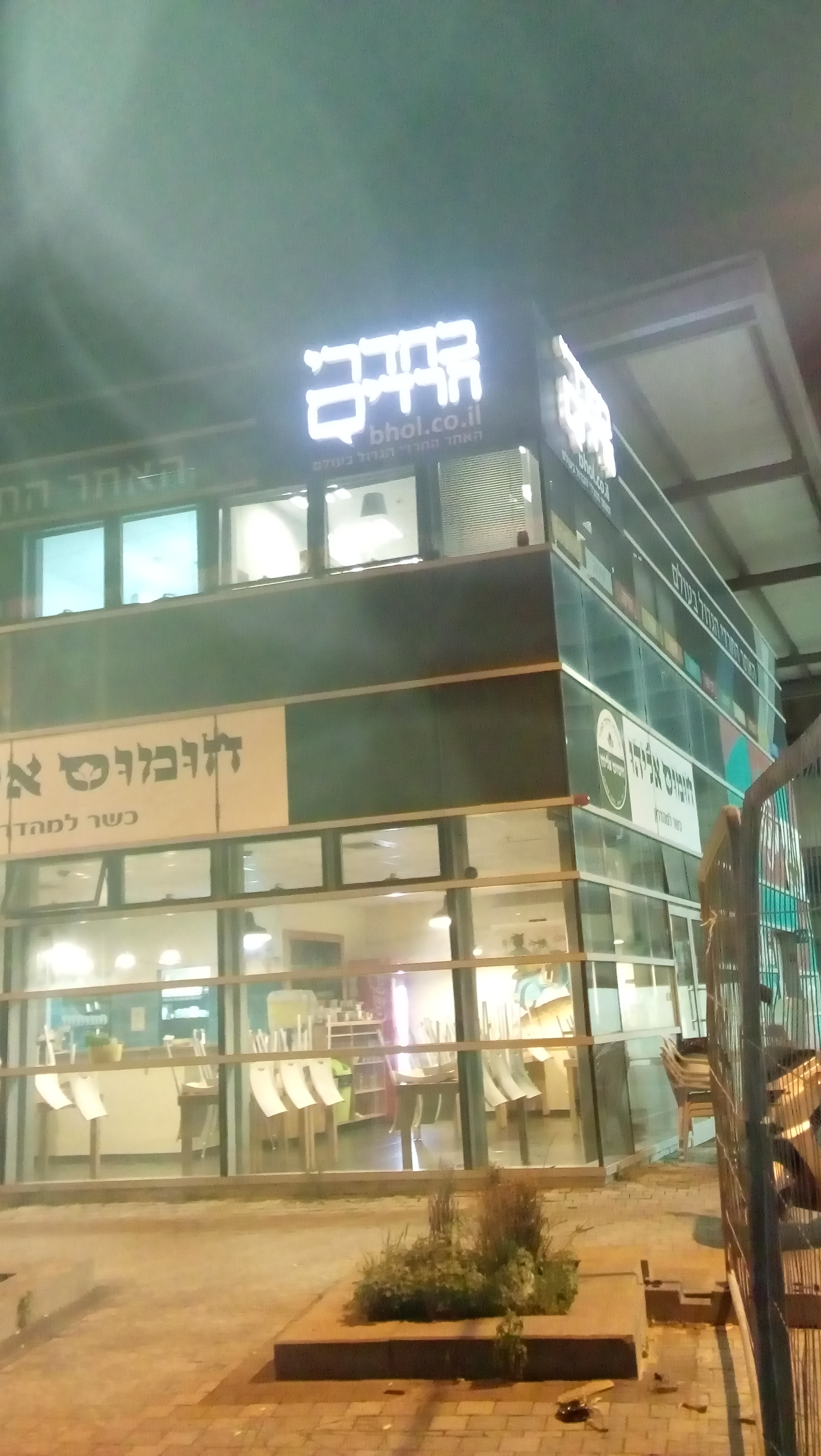 מערכת בחדרי חרדים